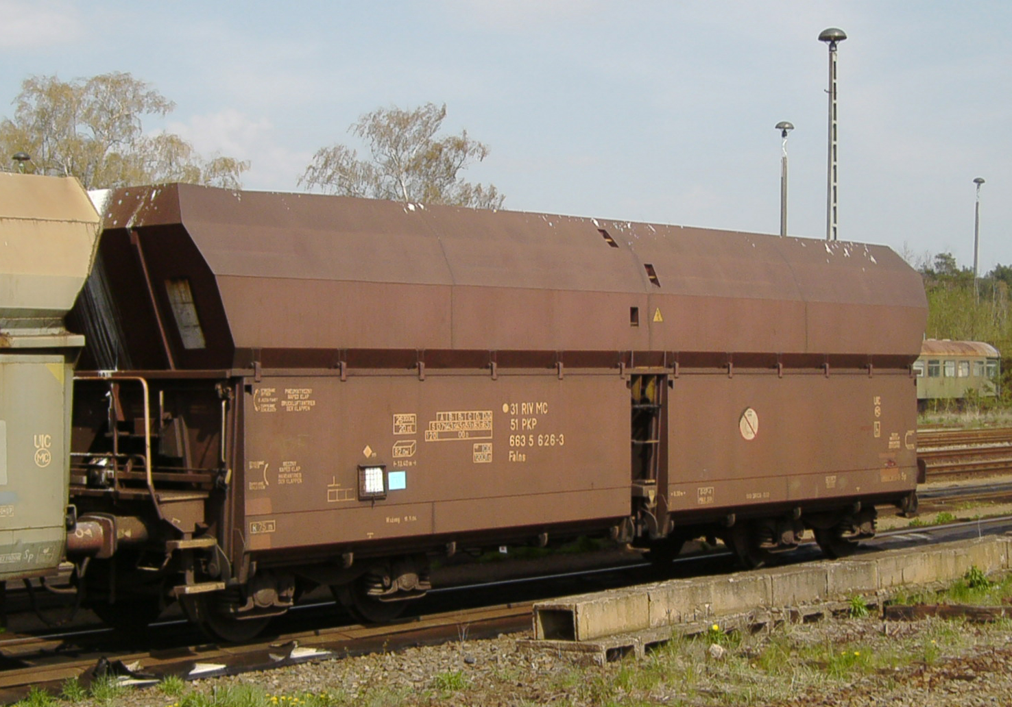 Offener Güterwagen mit sattelförmigem Wagenboden und schlagartiger beidseitiger Schwerkraftentladung (Sattelwagen) der Gattung Falns, Eigentümer: PKP. Aufgenommen im Güterbahnhof Horka / Oberlausitz.